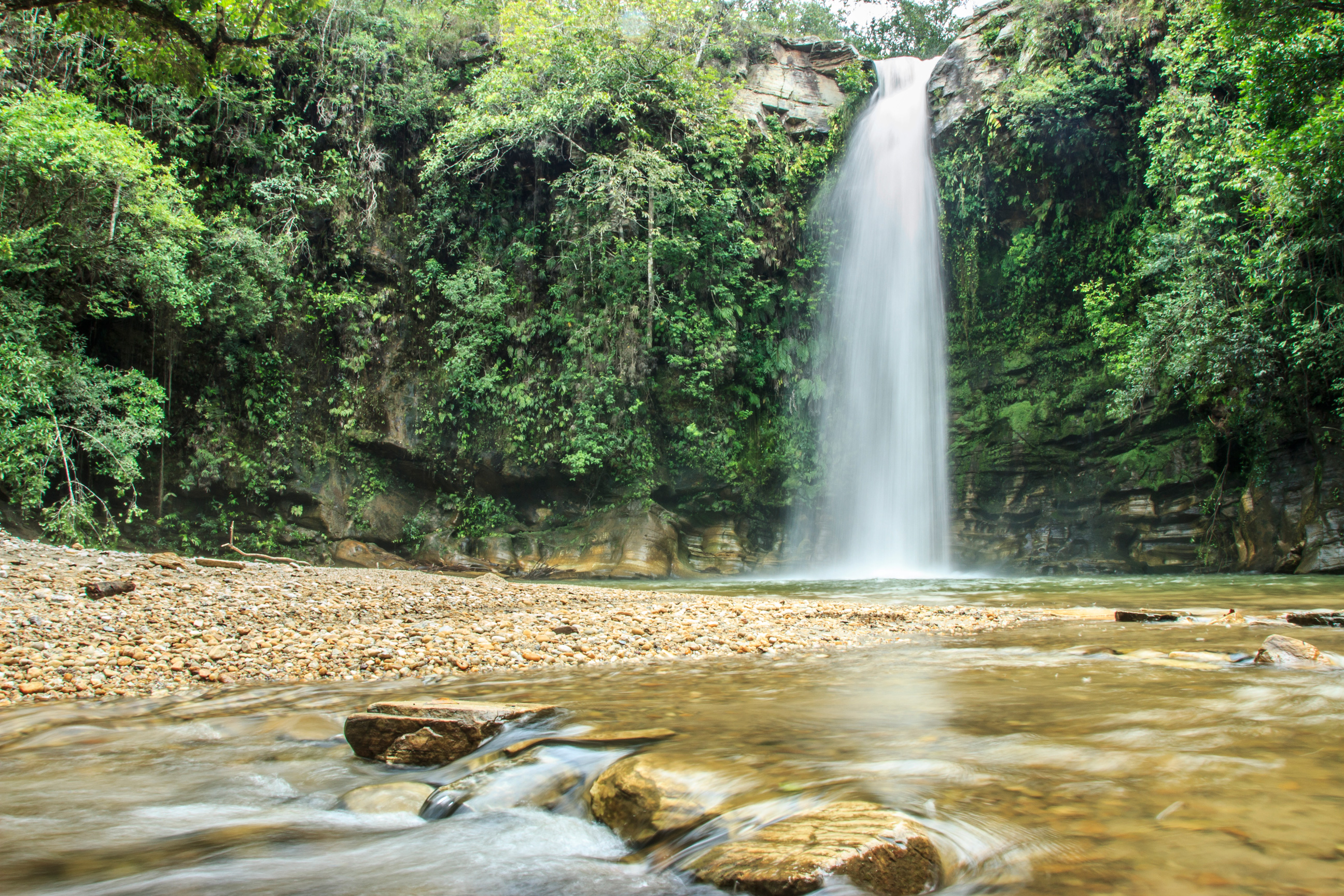 Com mais de 20 metros de altura, esta cachoeira exibe a força da natureza numa queda brusca e totalmente vertical.